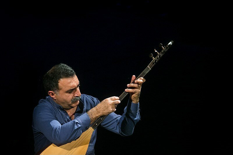 هم‌نوازی کیهان کلهر،کمانچه‌نواز ایرانی و اردال ارزنجان، موسیقدان ترک و نوازنده ساز باغلاما